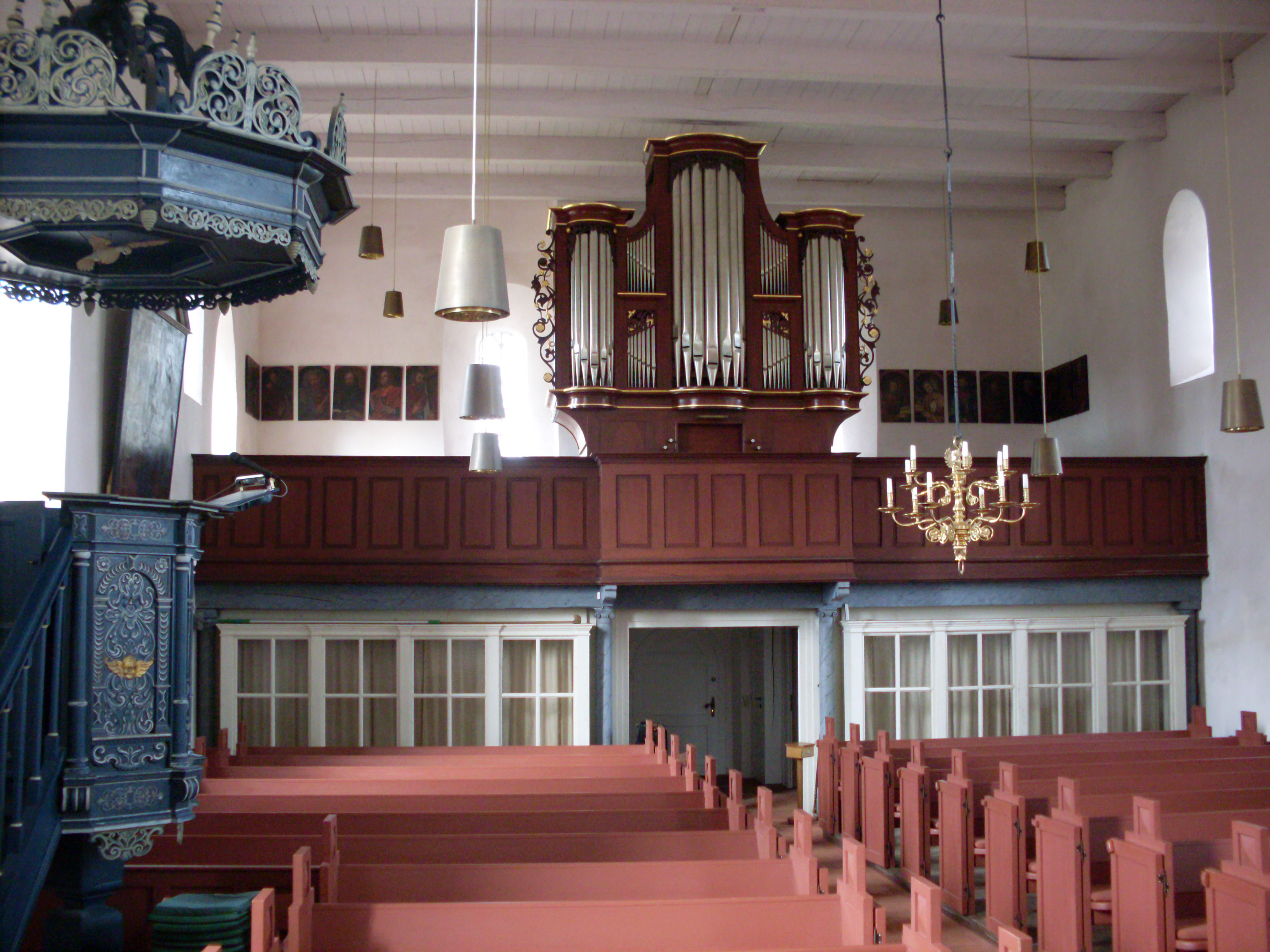 Stedesdorf, Orgel